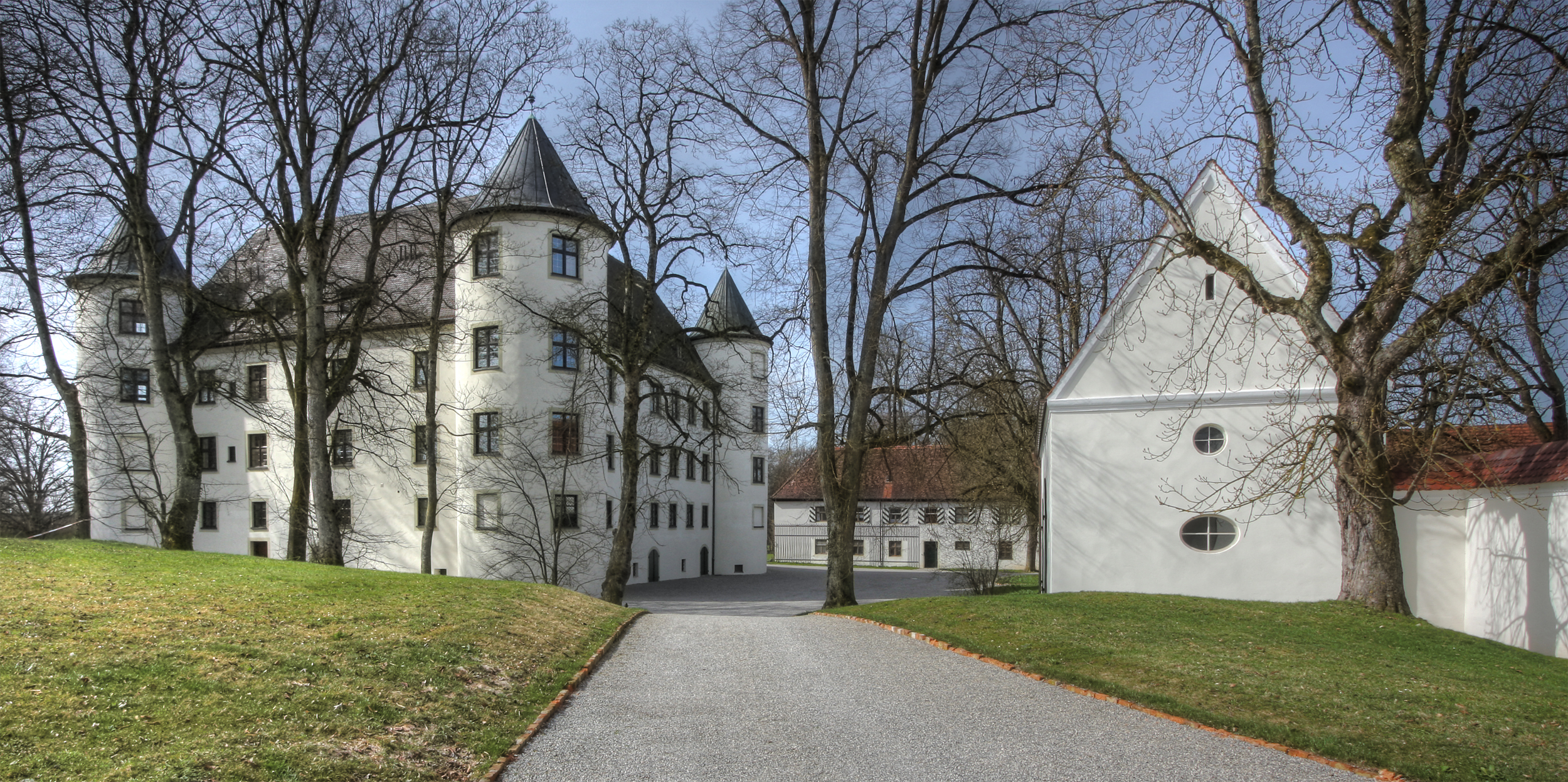 Jettingen-Scheppach, Schloss Jettingen, Stammsitz der Familie Stauffenberg